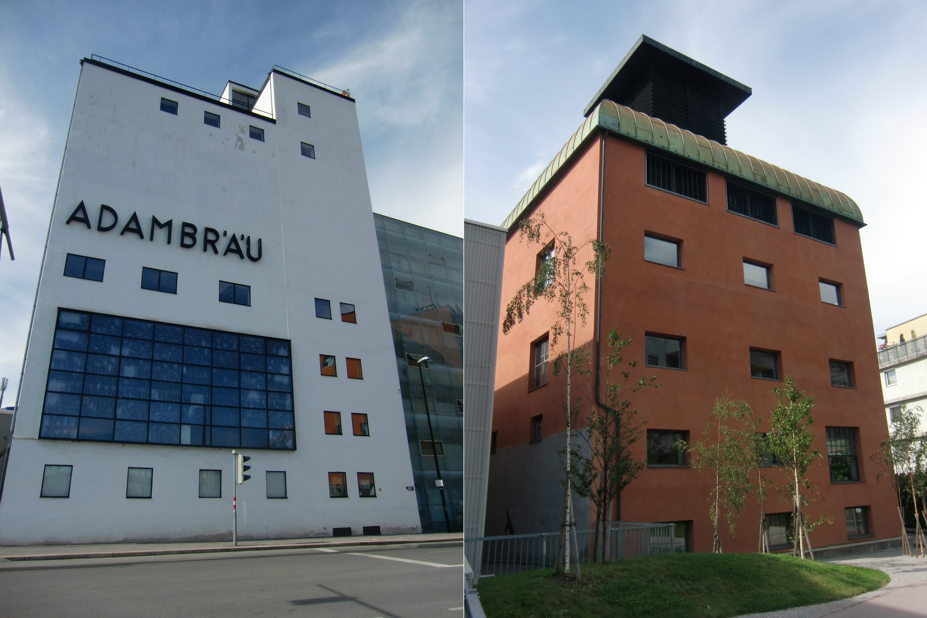 Ehem. Adambräu - Sudhaus und Kühlschiff